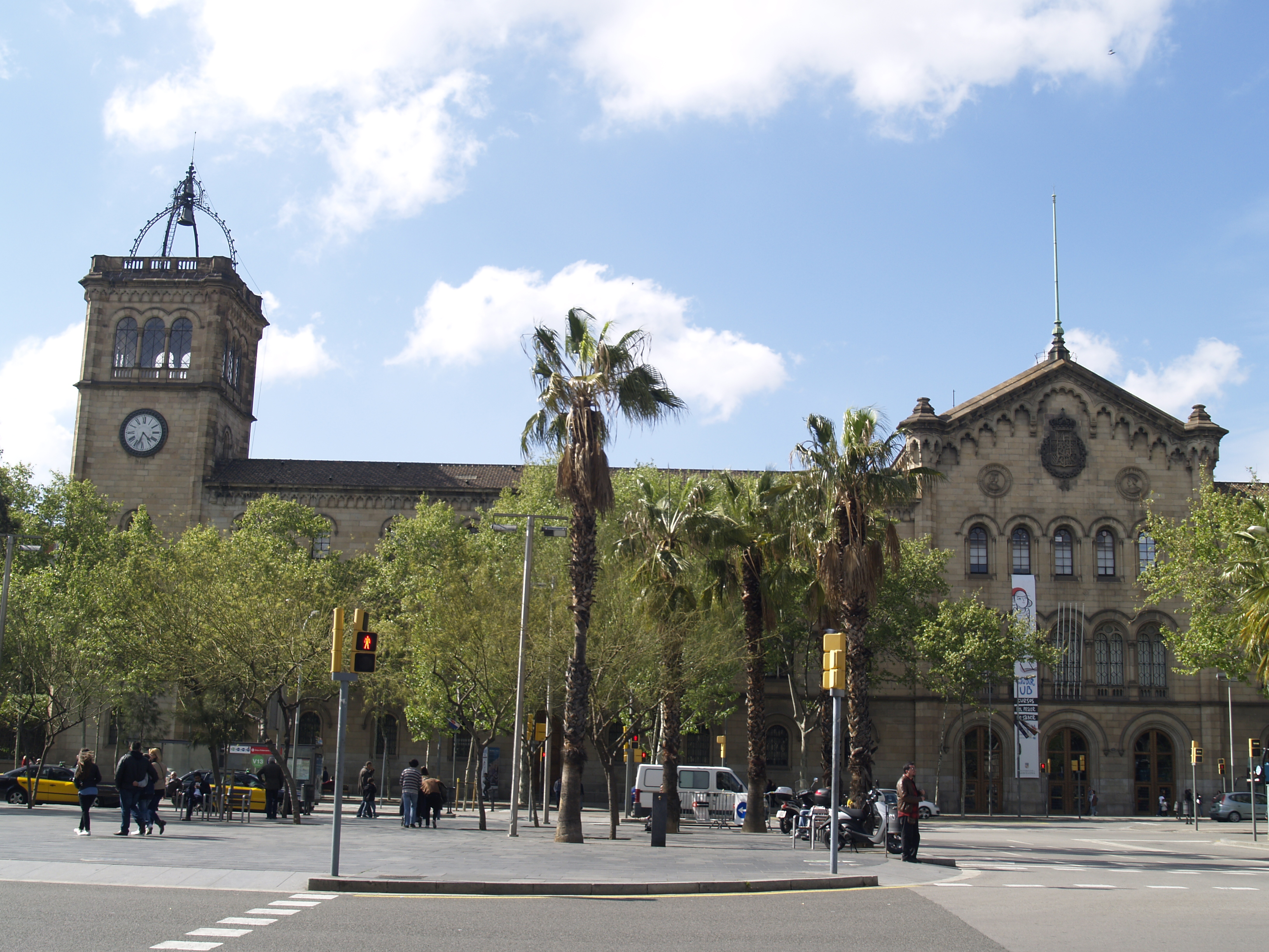 {nombre }